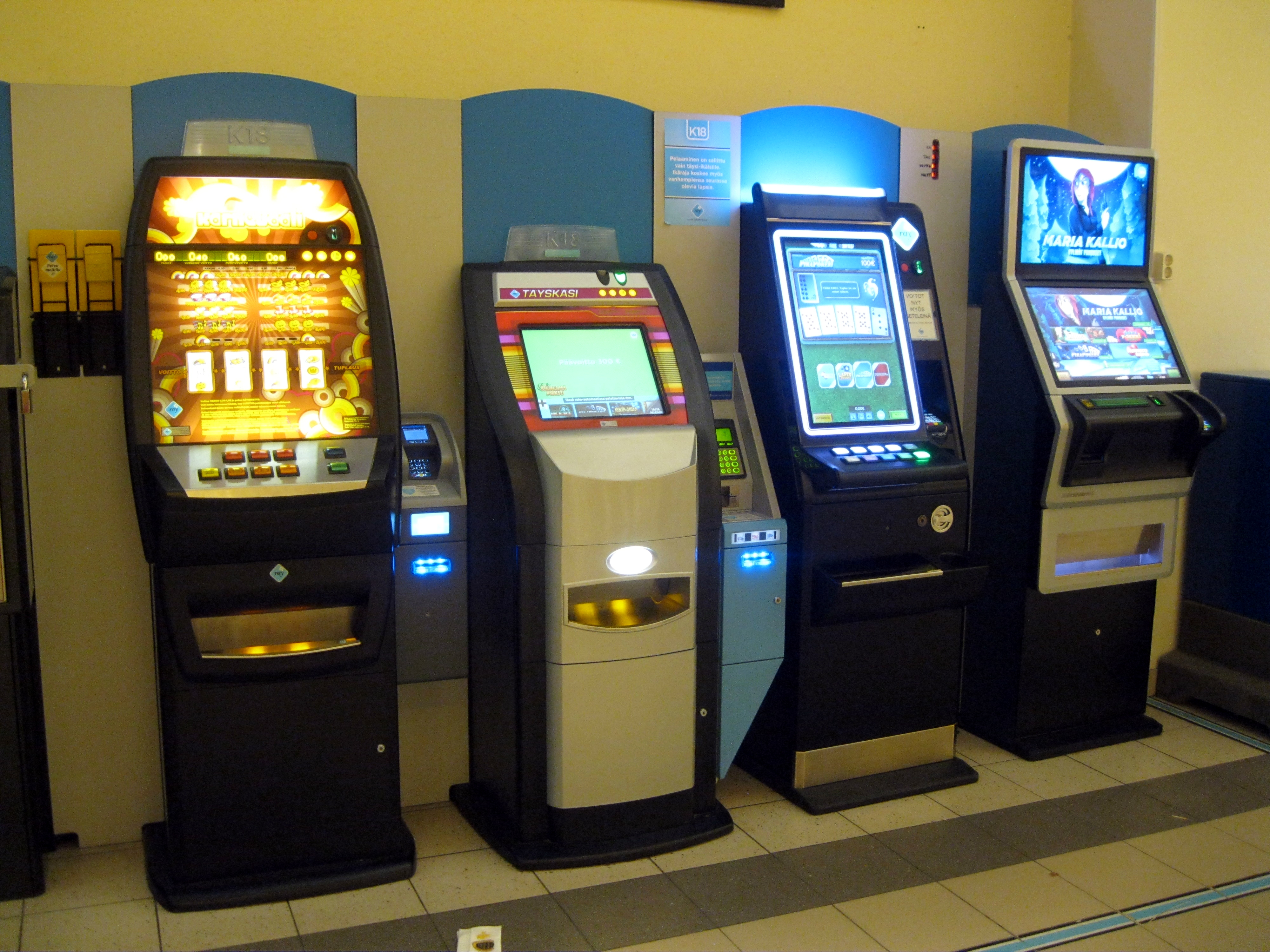 RAY Karnevaali, Täyskäsi ja Pikapokeri pelikoneet.